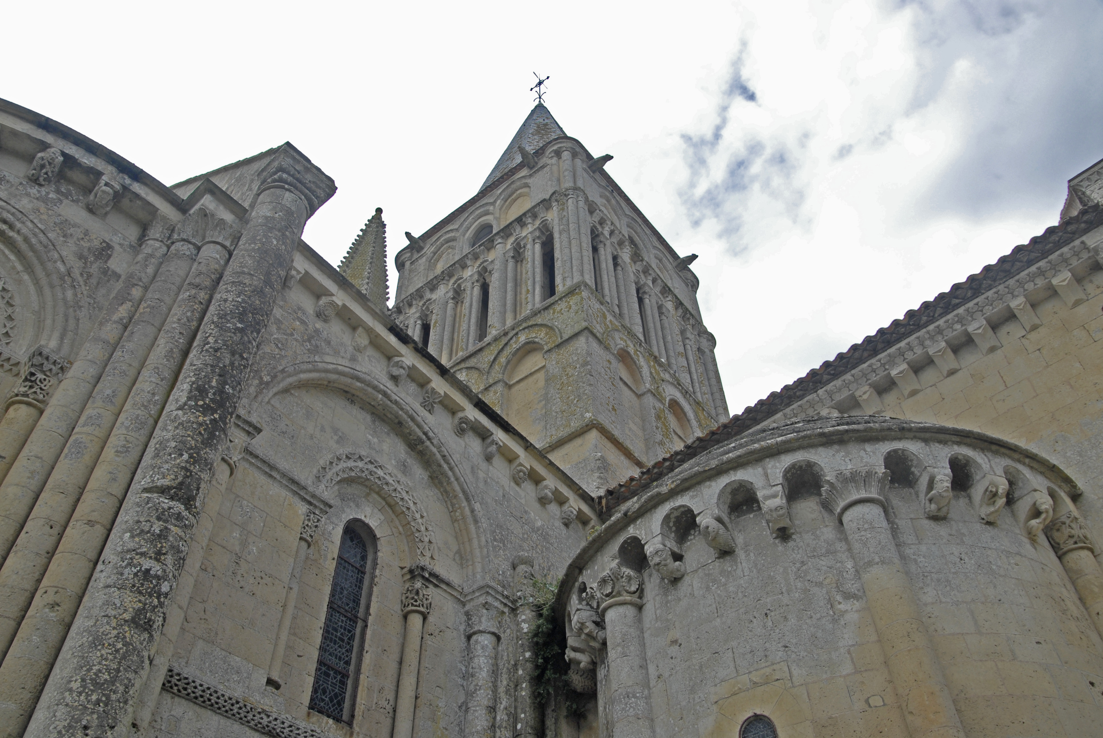 St-Pierre d'Aulnay, Vierungdturm von NO